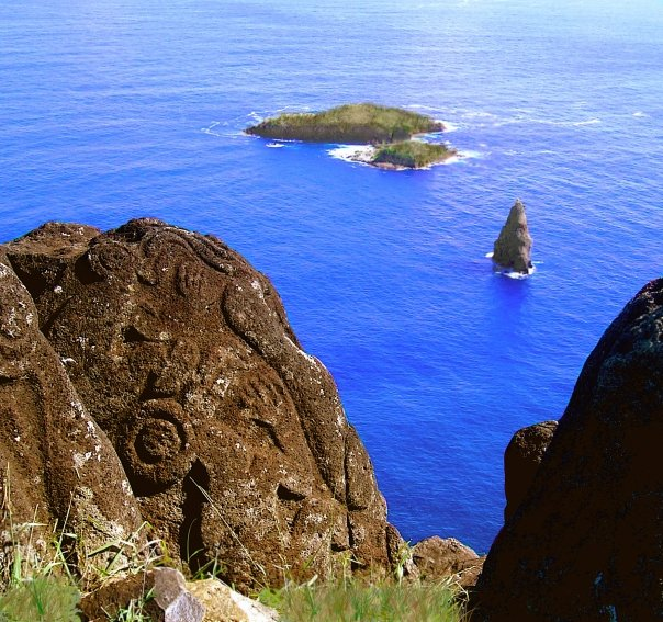 Isla de Pascua This is a photo of a national monument in Chile: 628